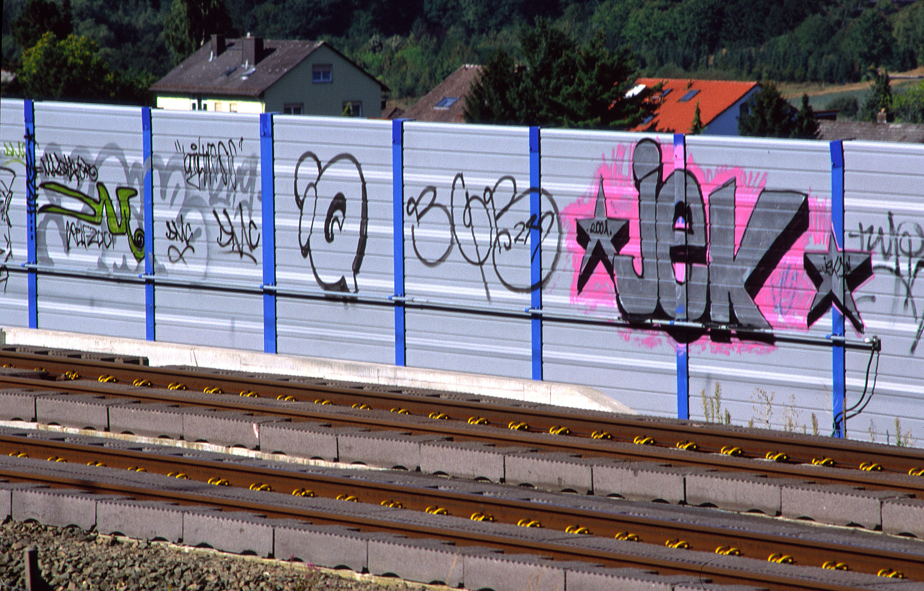 Lärmschutzwand mit Graffiti an Schnellfahrstrecke Köln - Rhein/Main nahe Idstein